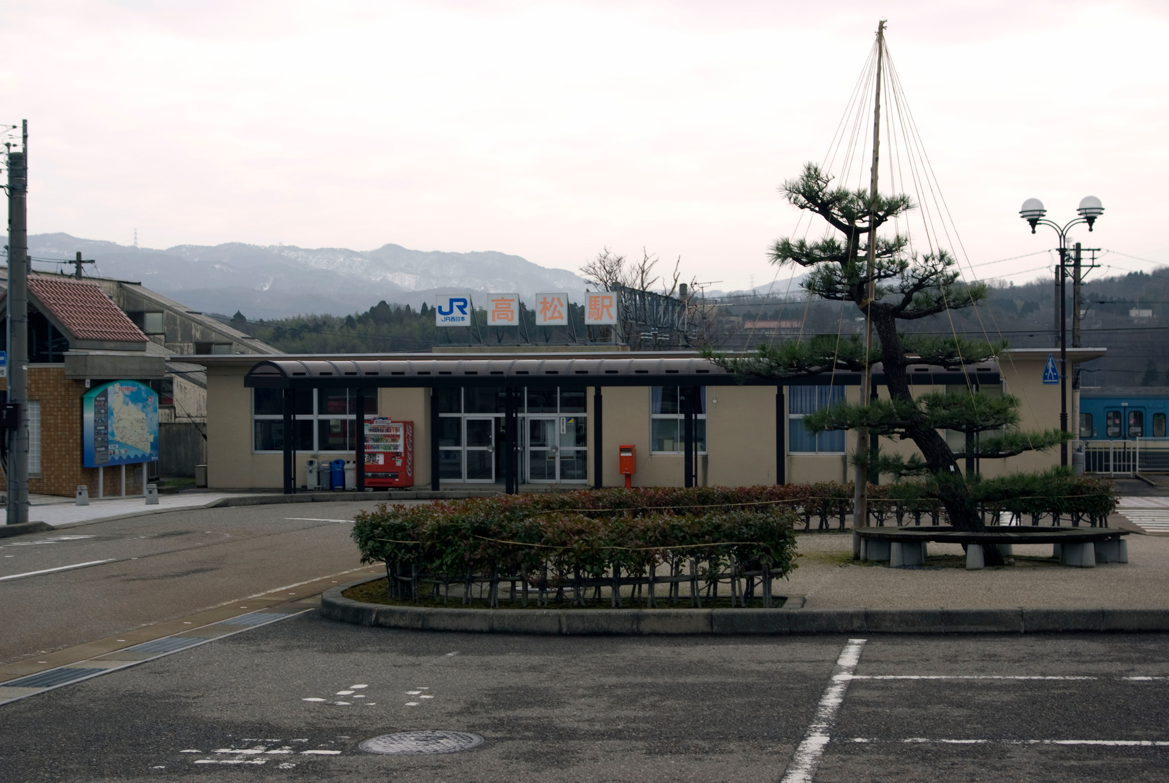 Template:西日本旅客鉄道七尾線高松駅